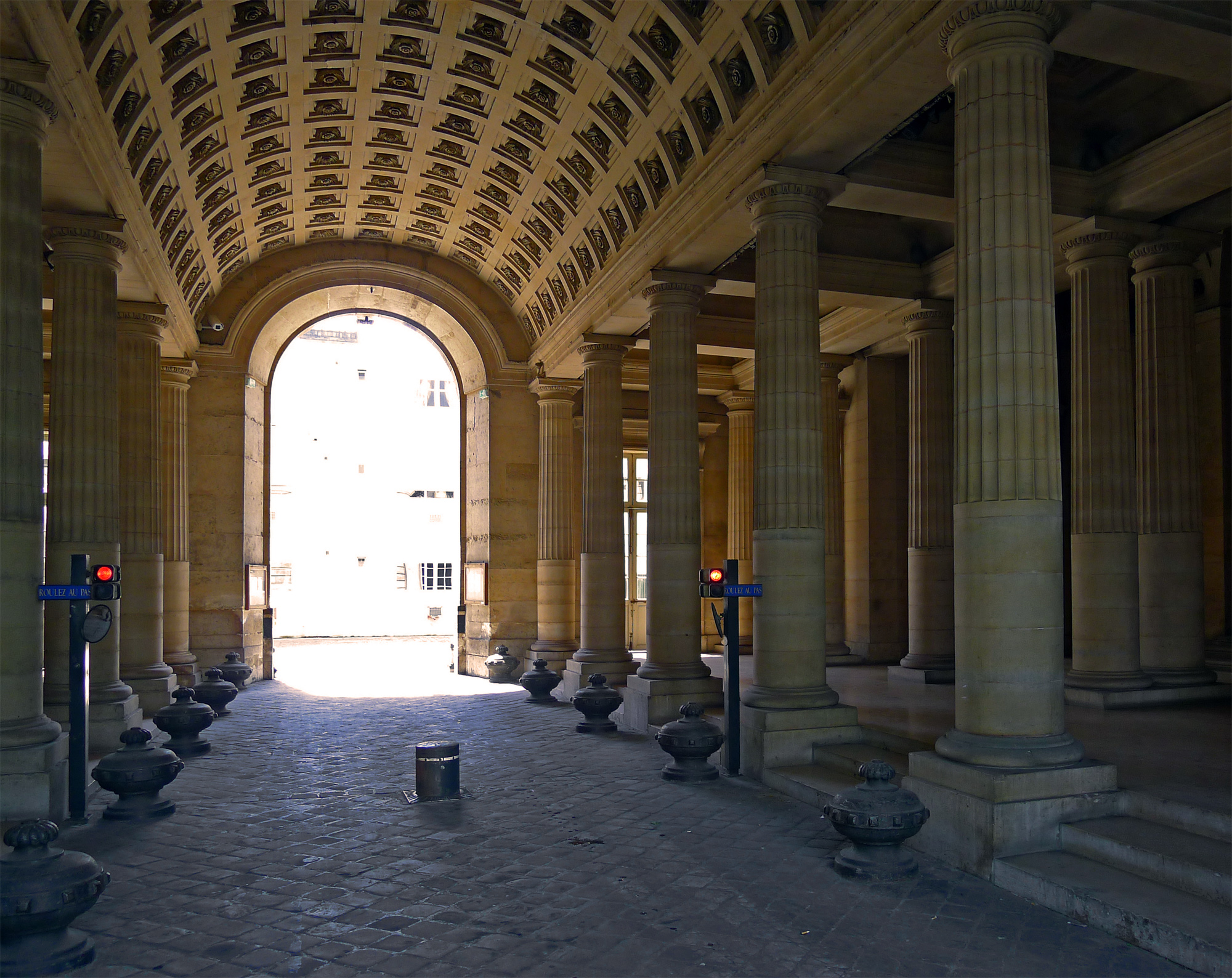 Hôtel de la Monnaie (Classé) - Paris VI .